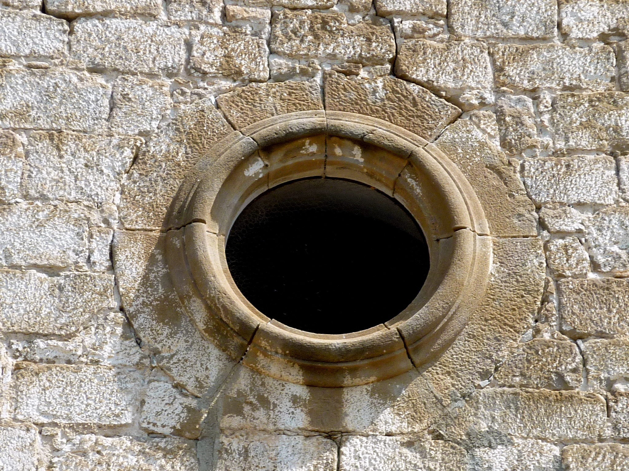 Església Vila de Perdiguers (Castellar de la Ribera): ócul